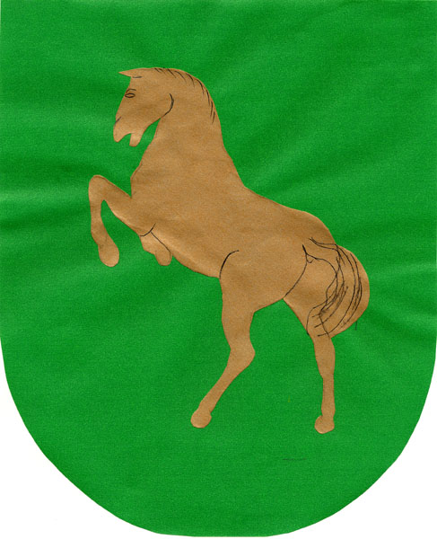 Znak obce Újezd u Černé Hory